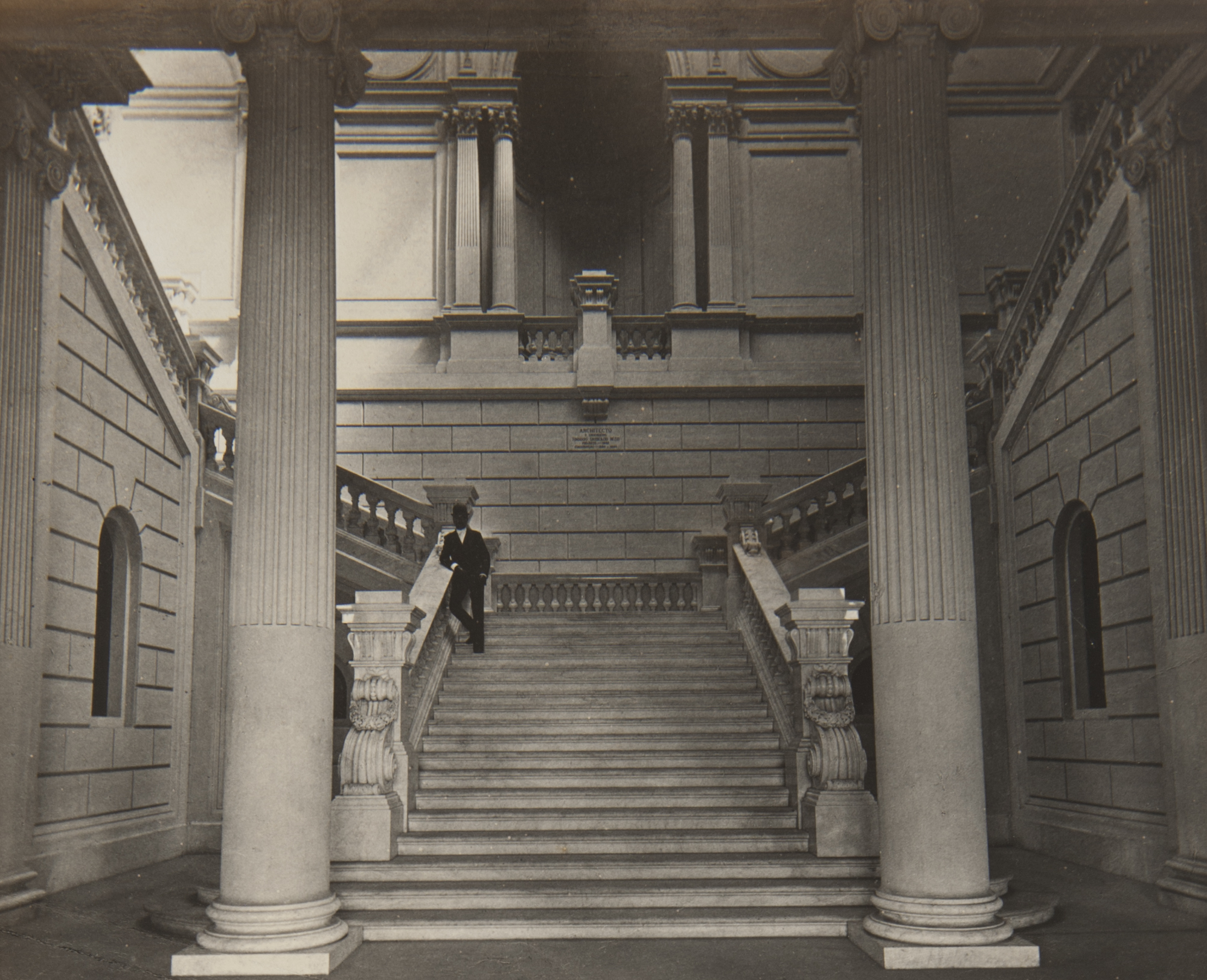 Obra que integra o acervo do Museu Paulista da USP.